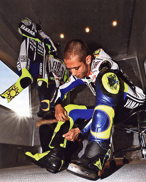 Rossi